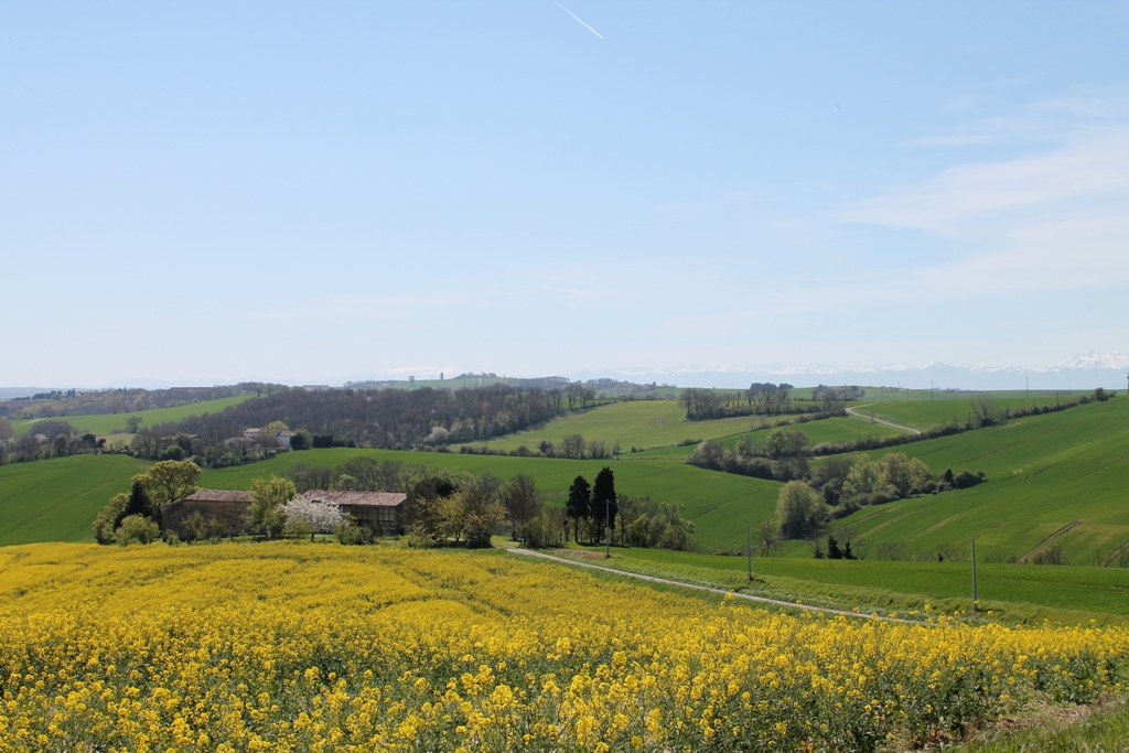 Le printemps sur les coteaux sud du Lauragais. On aperçoit les Pyrénées au fond.